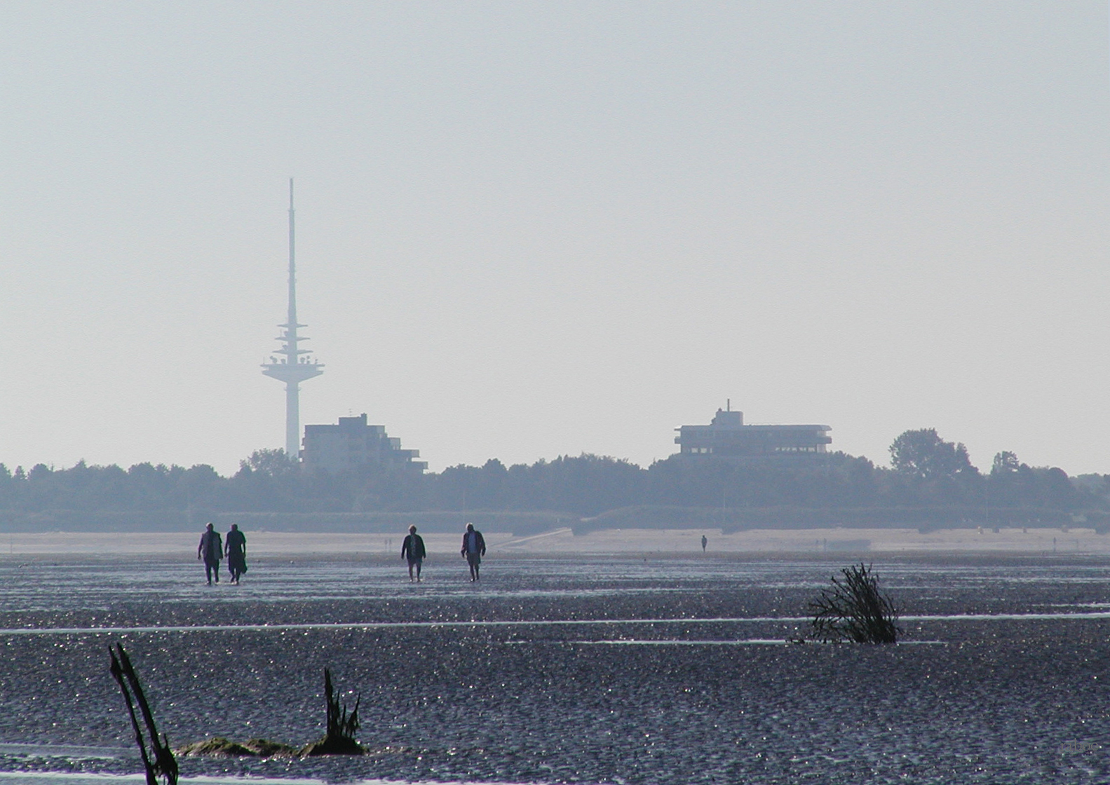 Im Watt bei Dunen, der Friedrich Clemens Gerke Turm und der Strand im Frühdunst